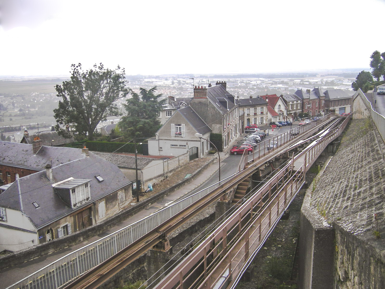 Laon - funiculaire